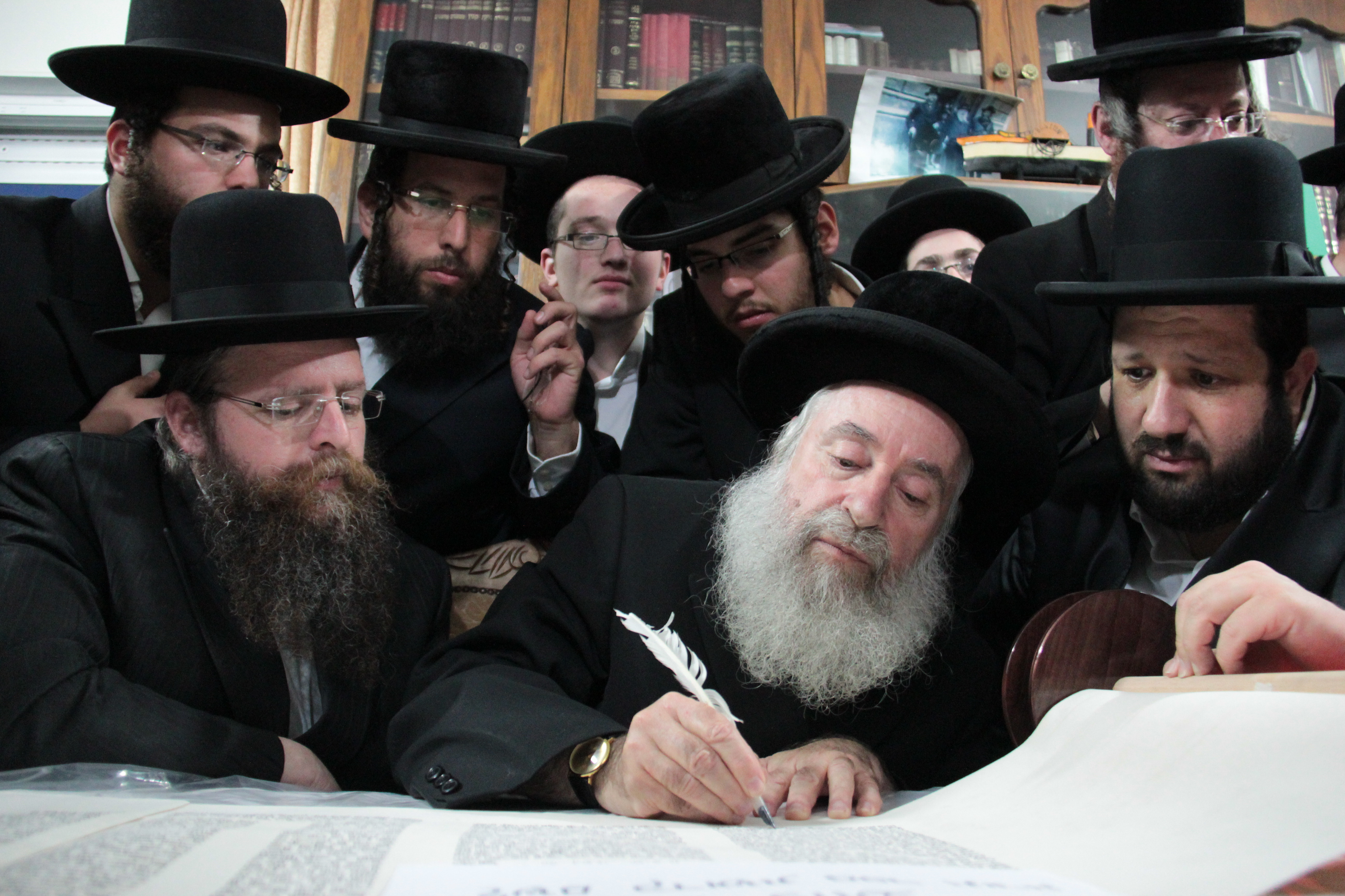 כתיבת ספר תורה לע"נ רבי שלמה שטנצל זצ"ל ניסן תשעד